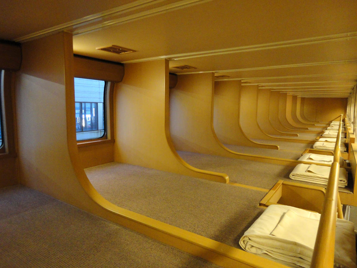 JR西日本285系 普通車指定席 ノビノビ座席（上段）